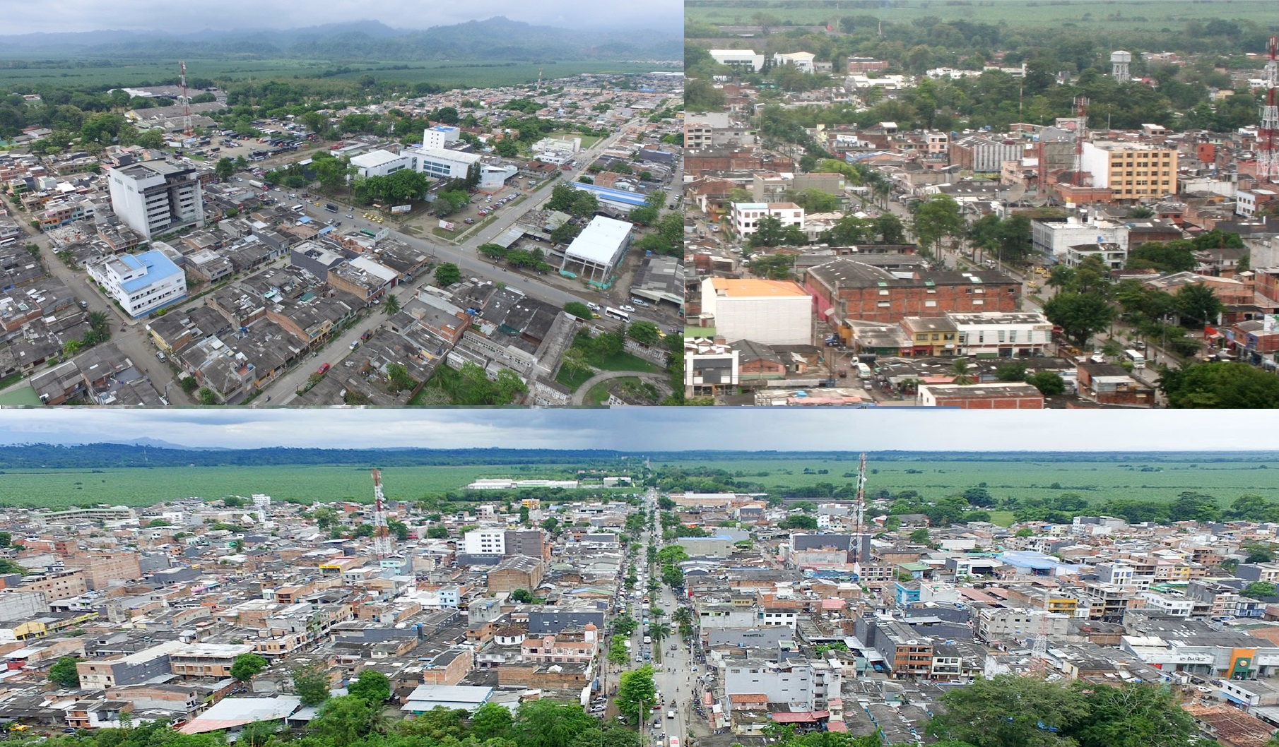 Panoramicas de la ciudad de Apartadó, Colombia